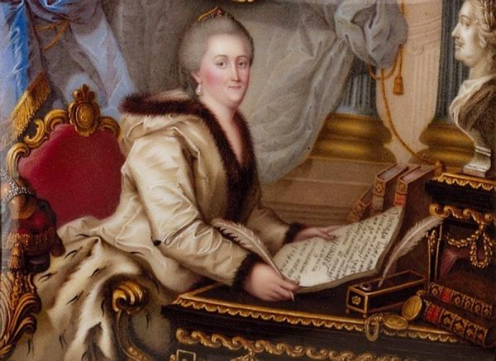 скачено